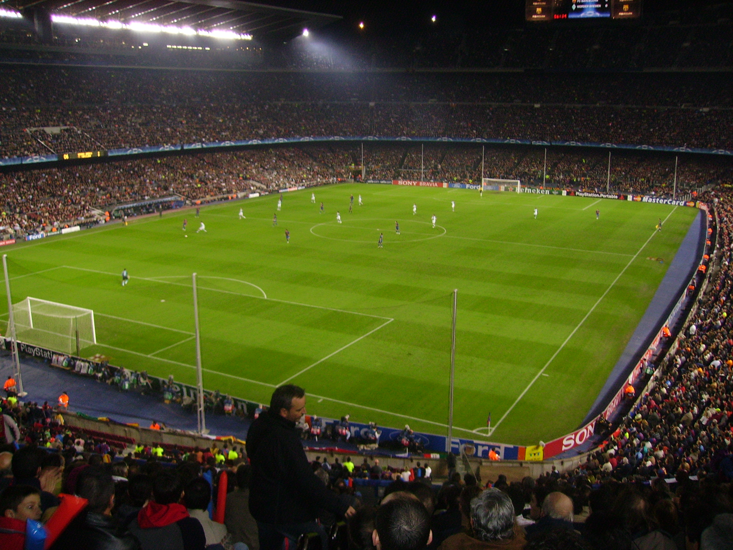 Barcelona vs Werder Bremen al Camp Nou, 5/12/2006.